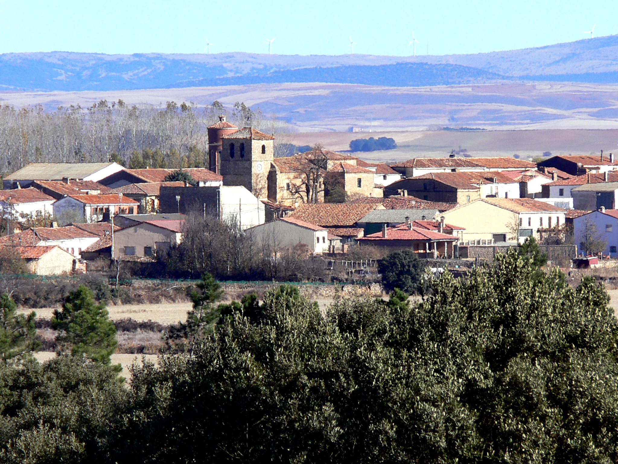 Cubo de la Solana. Un típico pueblo agrícola soriano.